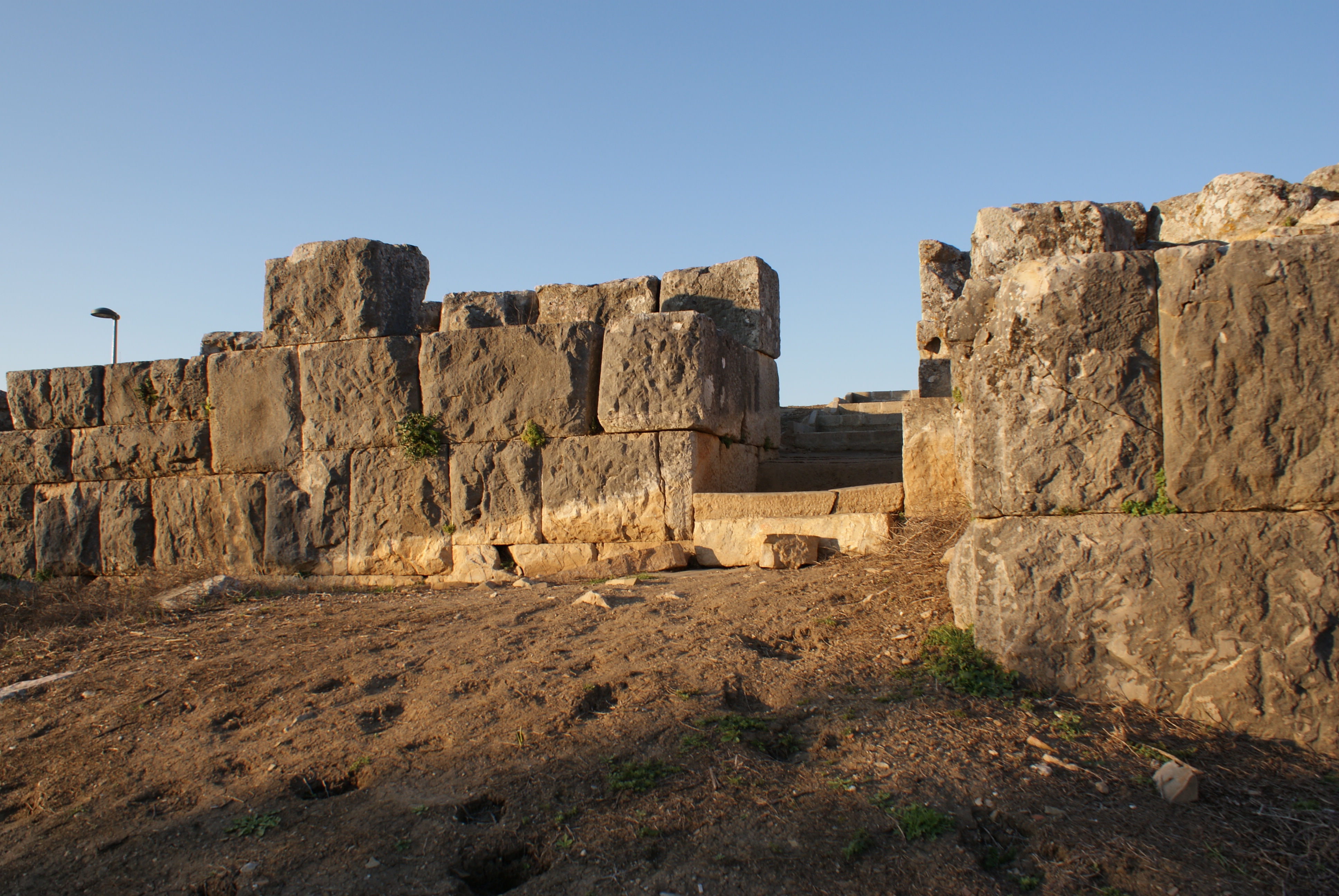 πυλιδα στην πρόερνα